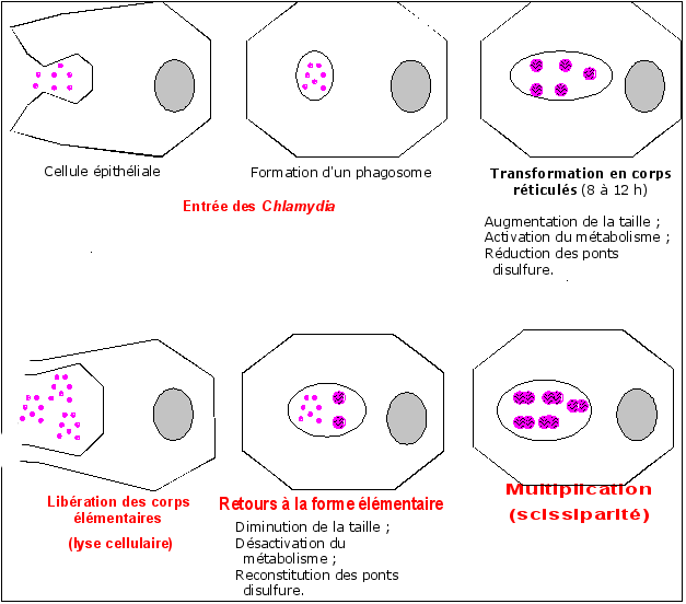 Cycle de développement des Chalmydia. Création personnelle. Février 2006